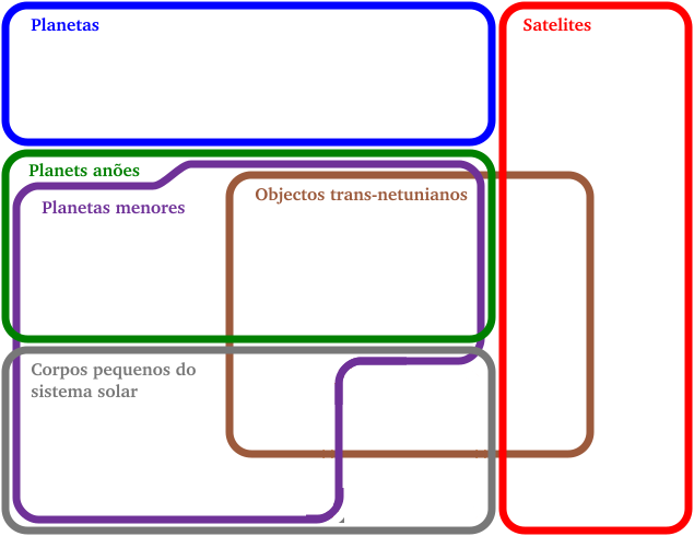 translation and adaptation of original SVG